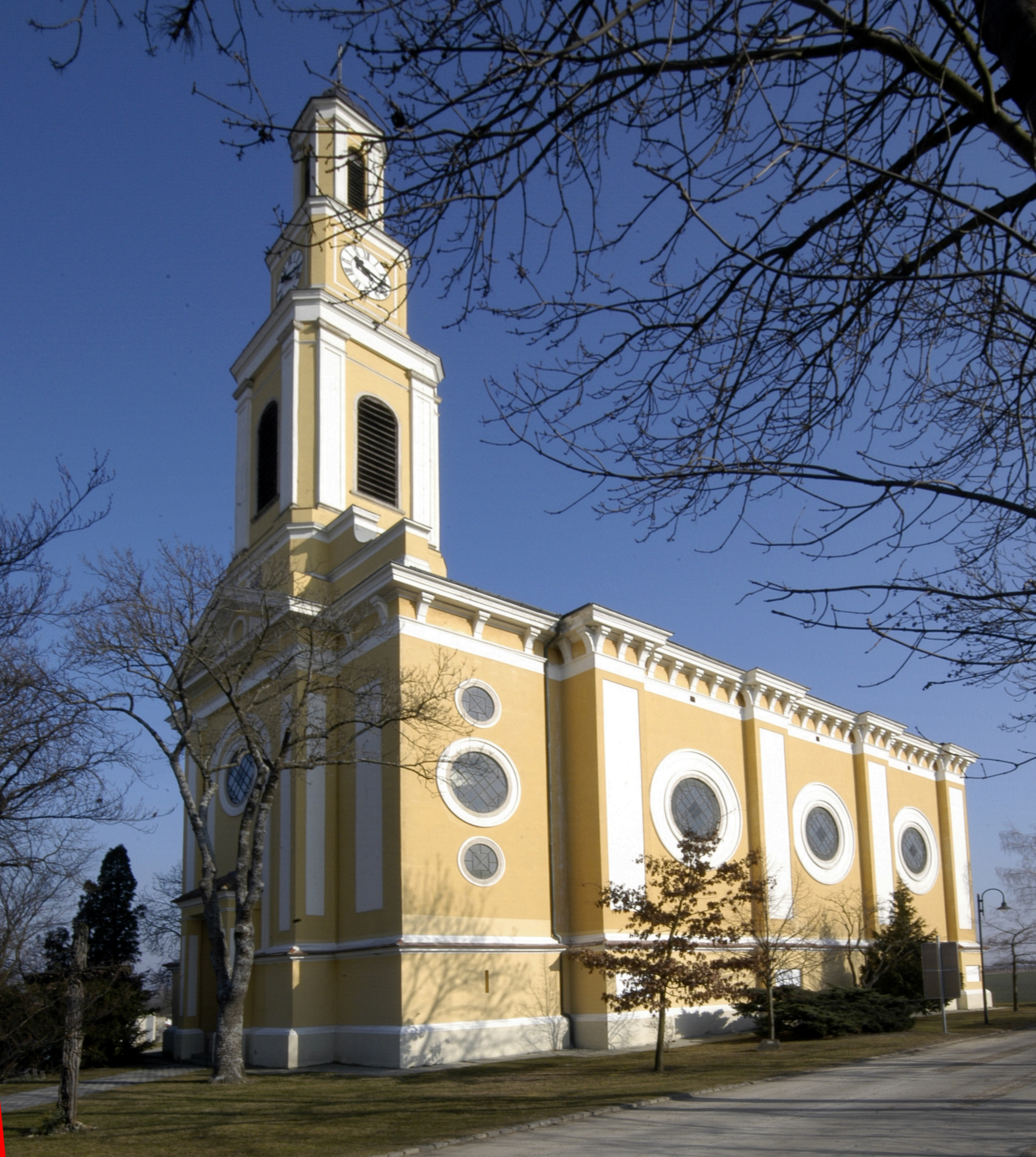 katholische Pfarrkirche heiliger Ulrich / Ansicht von Südwest